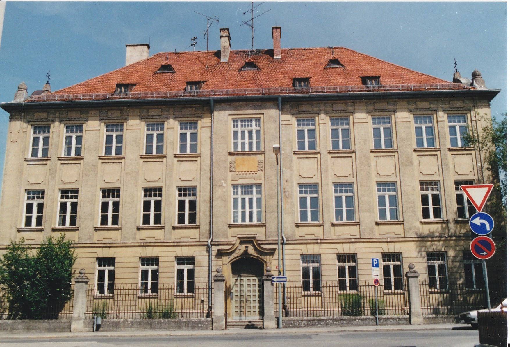 Altes Hauptgebäude der Karl-Meichelbeck-Realschule, Haydstraße 4